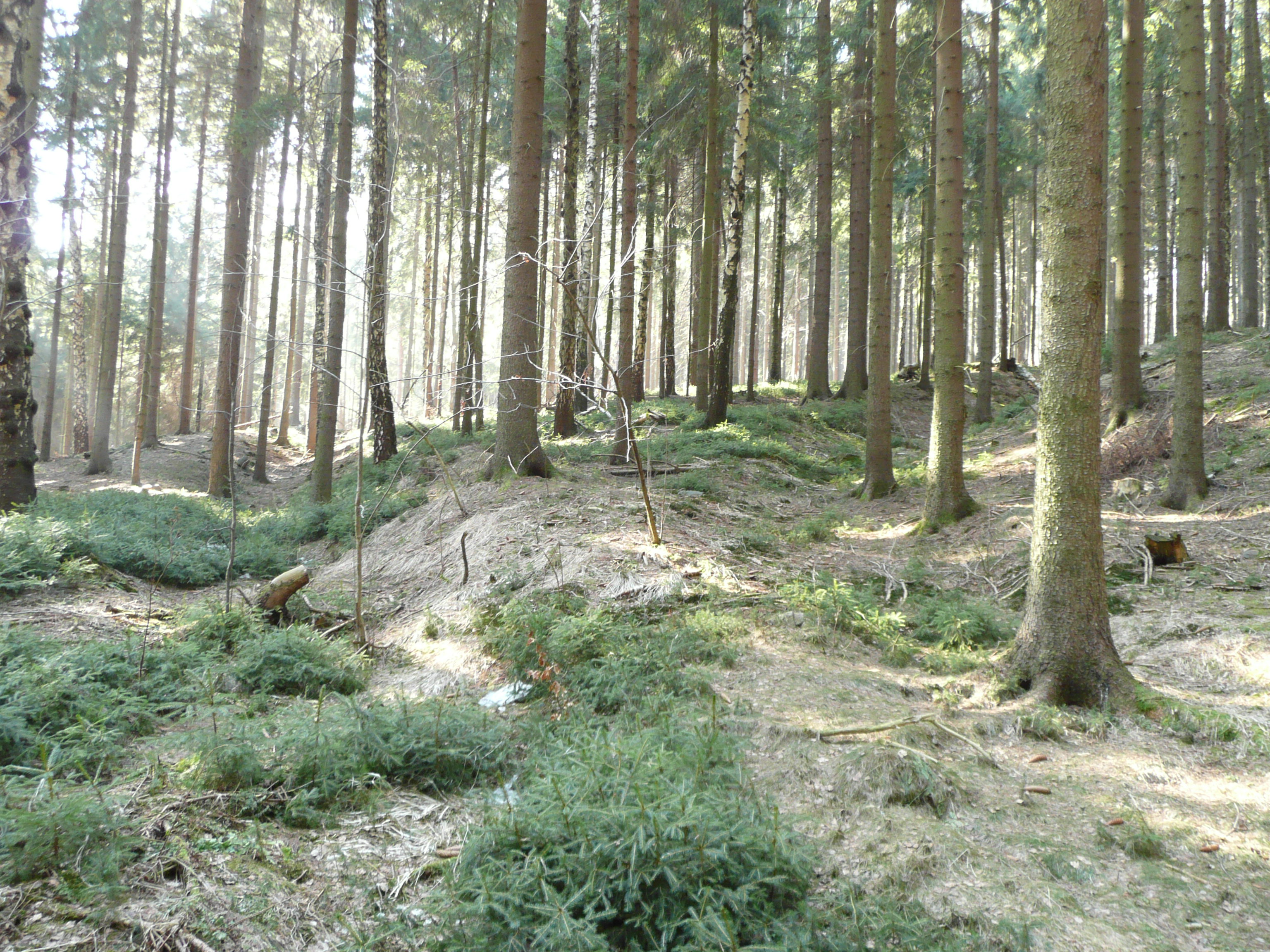 Zwei Hohlwege zur Wüstung Schwedengraben vom ehemaligen Vorwerk Neudeck (heute Teil von Niederlauterstein) kommend - Blick Richtung Westen vom Erdwerk der Wüstung